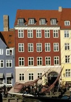 Denmark- Nyhavn 1